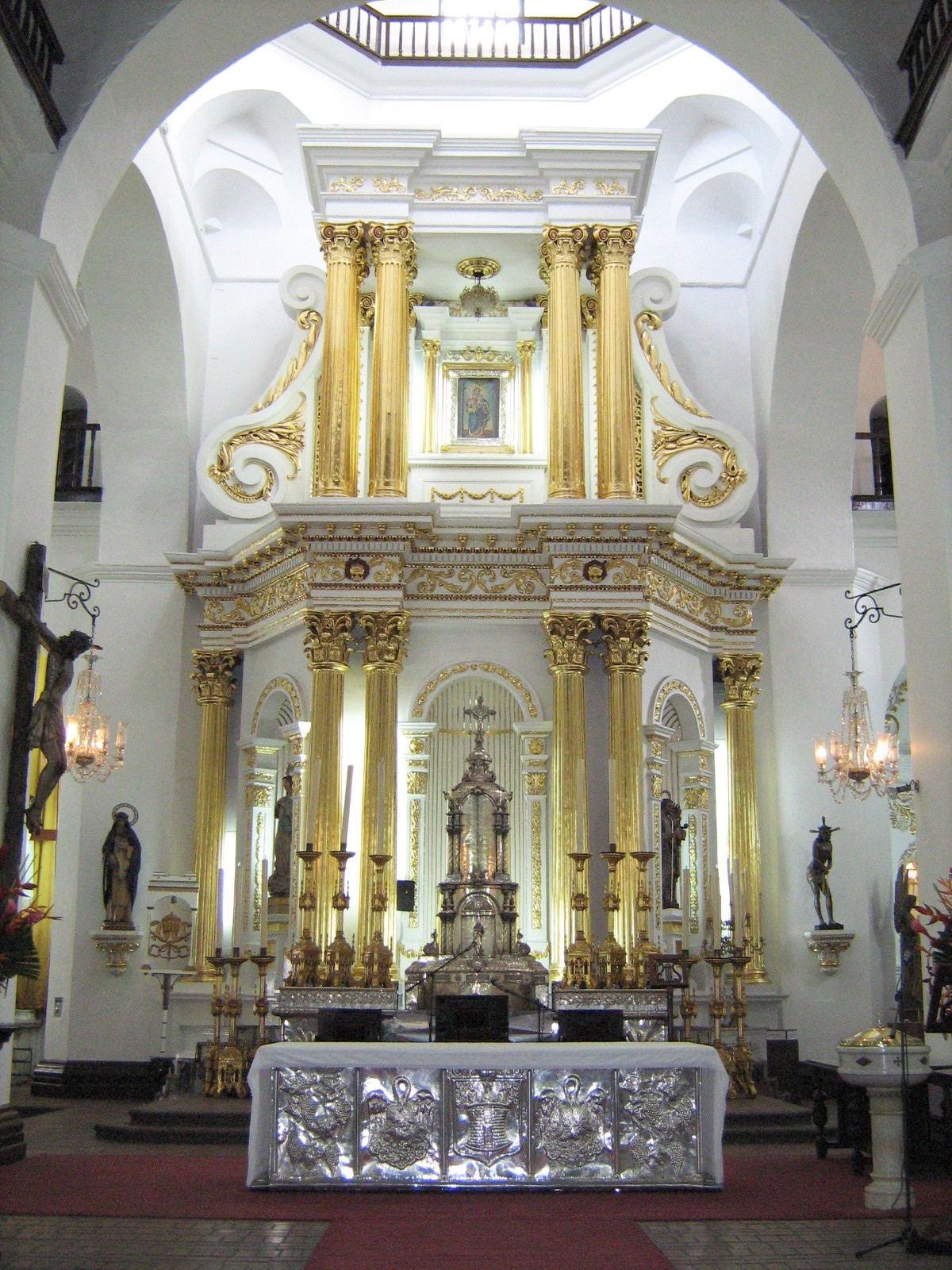 Basílica Menor de Nuestra Señora de la Candelaria, fue Catedral hasta 1931, Medellín, Colombia